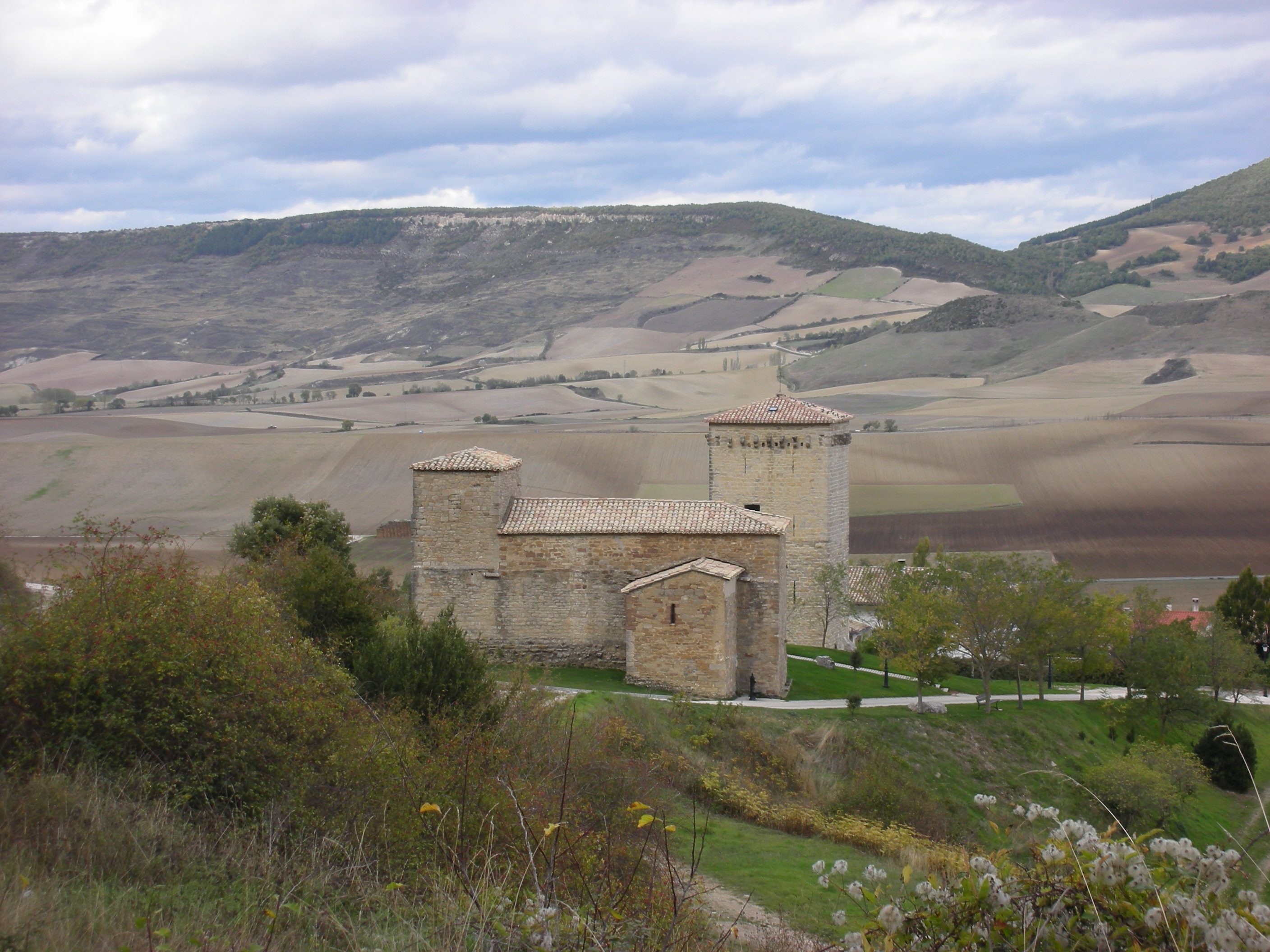 Pueblo de Yárnoz (Navarra). Siglo XII.